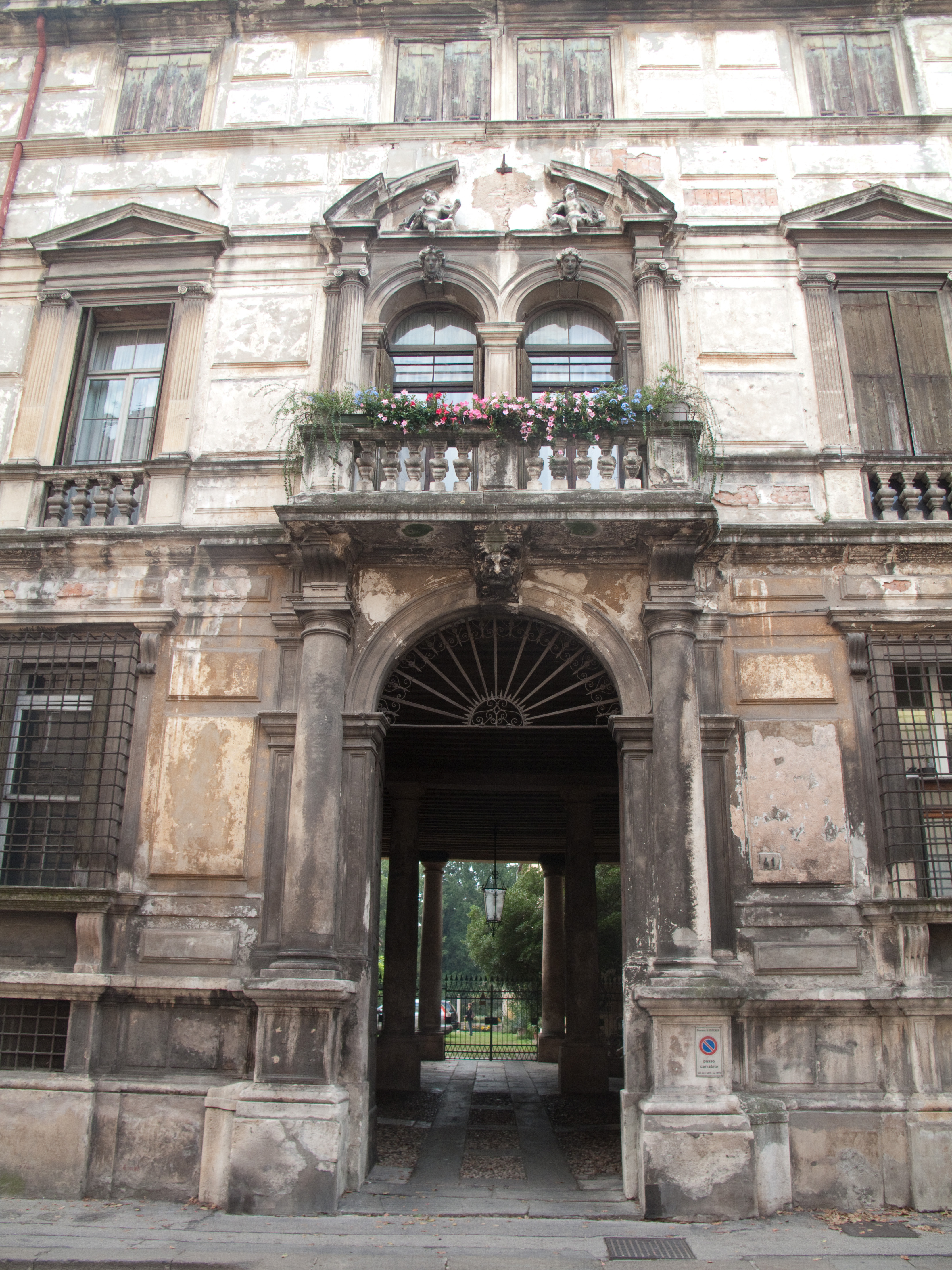 Vicenza - Borgo Pusterla - Palazzo Barbieri, facciata